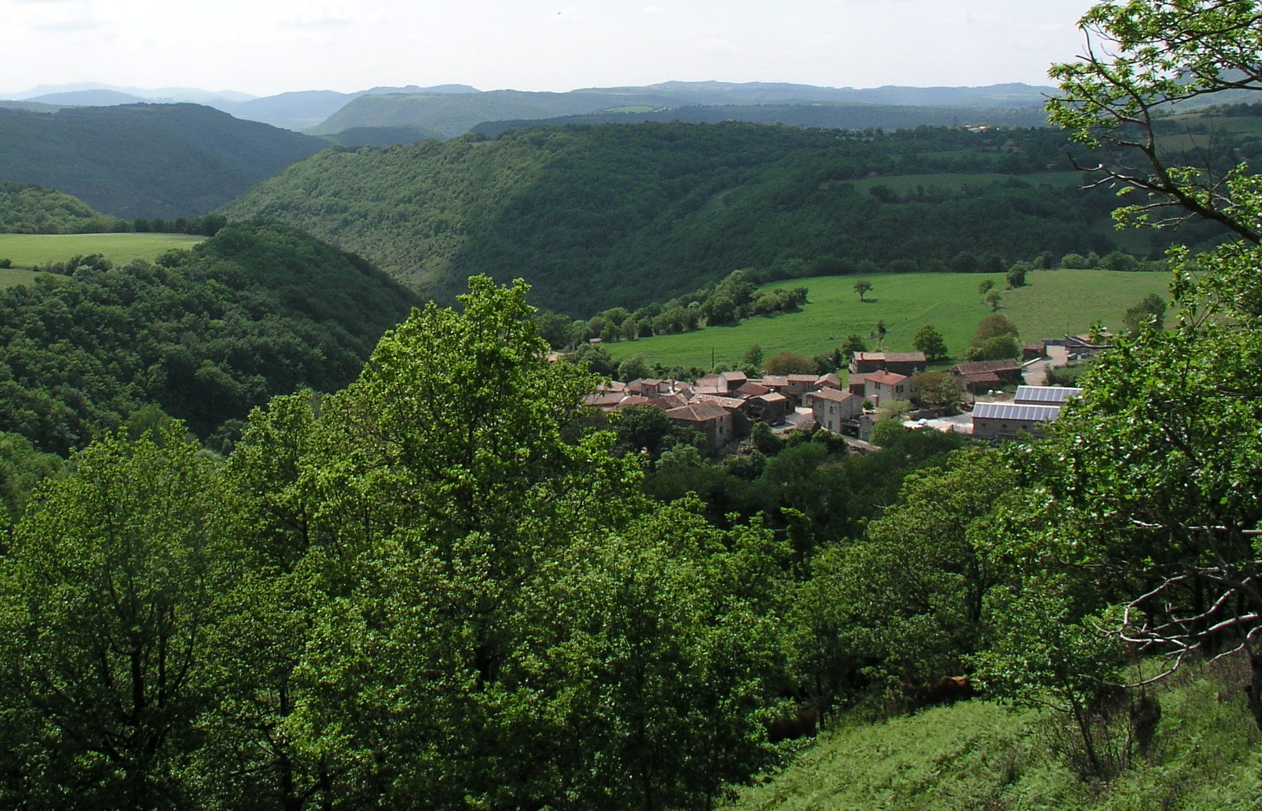 Romiguières (Hérault)